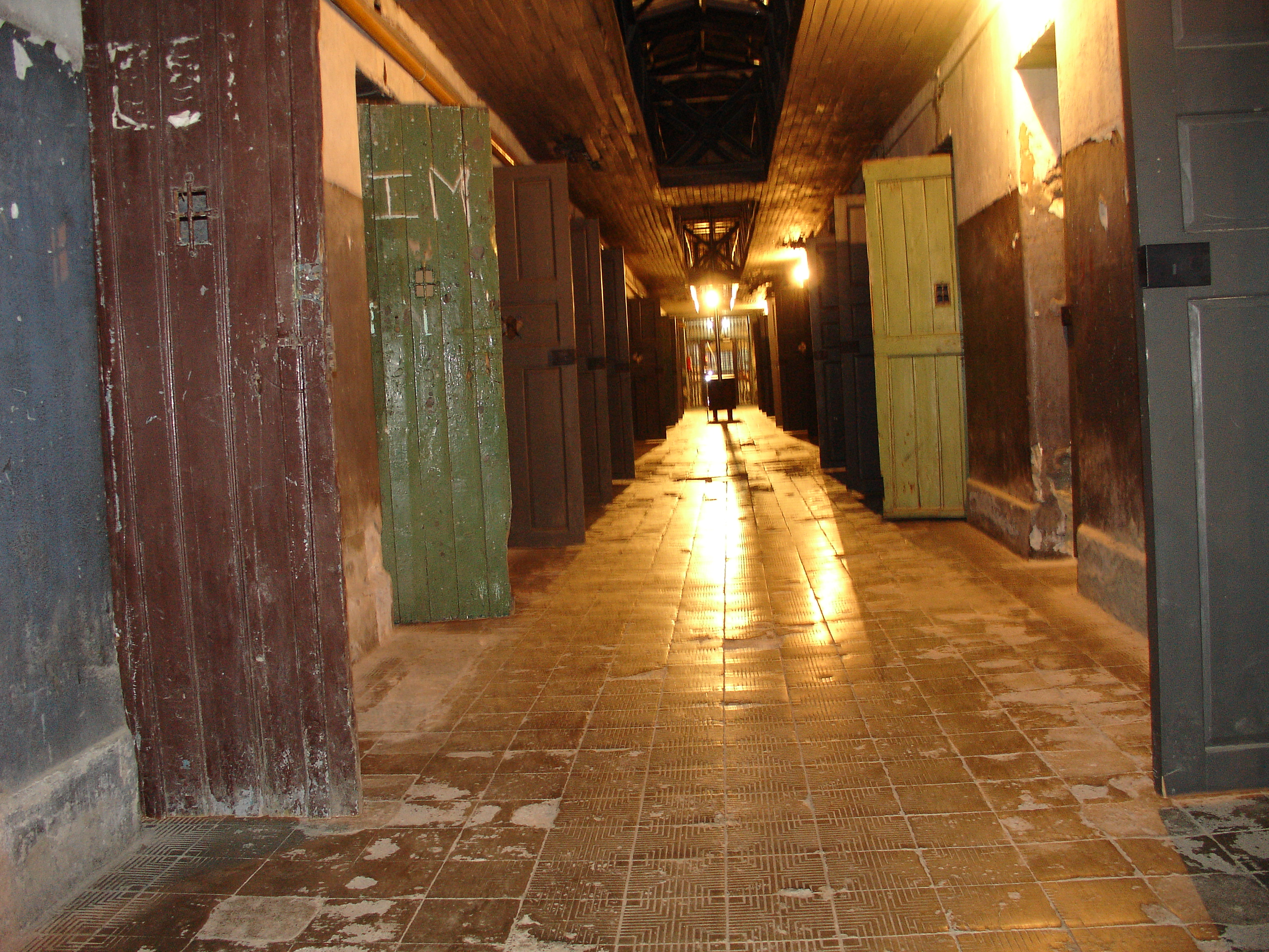 Ex presidio de Ushuaia y actual museo. Pabellón 3, que se mantiene en las mismas condiciones desde que fue cerrada la cárcel en 1947.